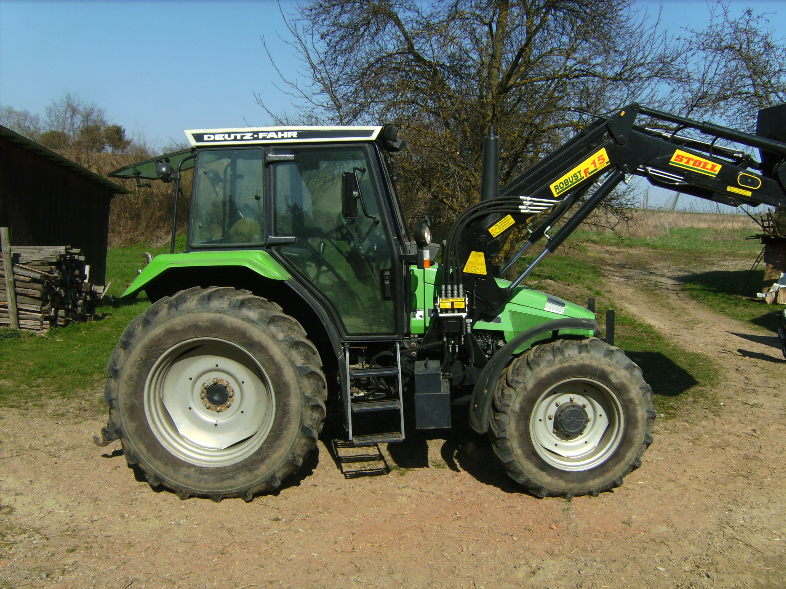 Deutz-Fahr AgroXtra 4.47 mit Stoll-Frontlader